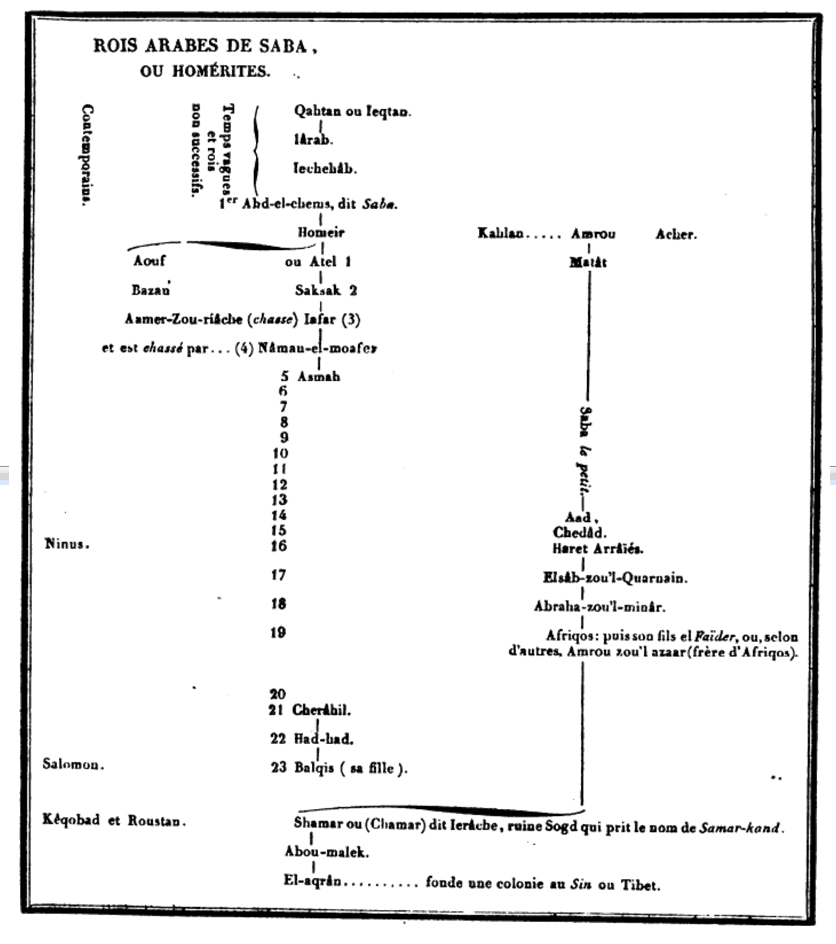 Généalogie de Balqis, reine de Saba (Œuvres de Volney, 1825)